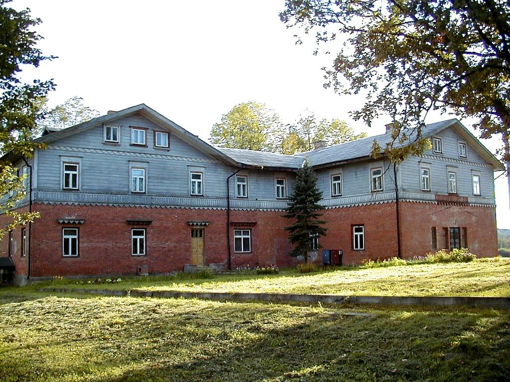 Mālmuižas pils 2000-09-14